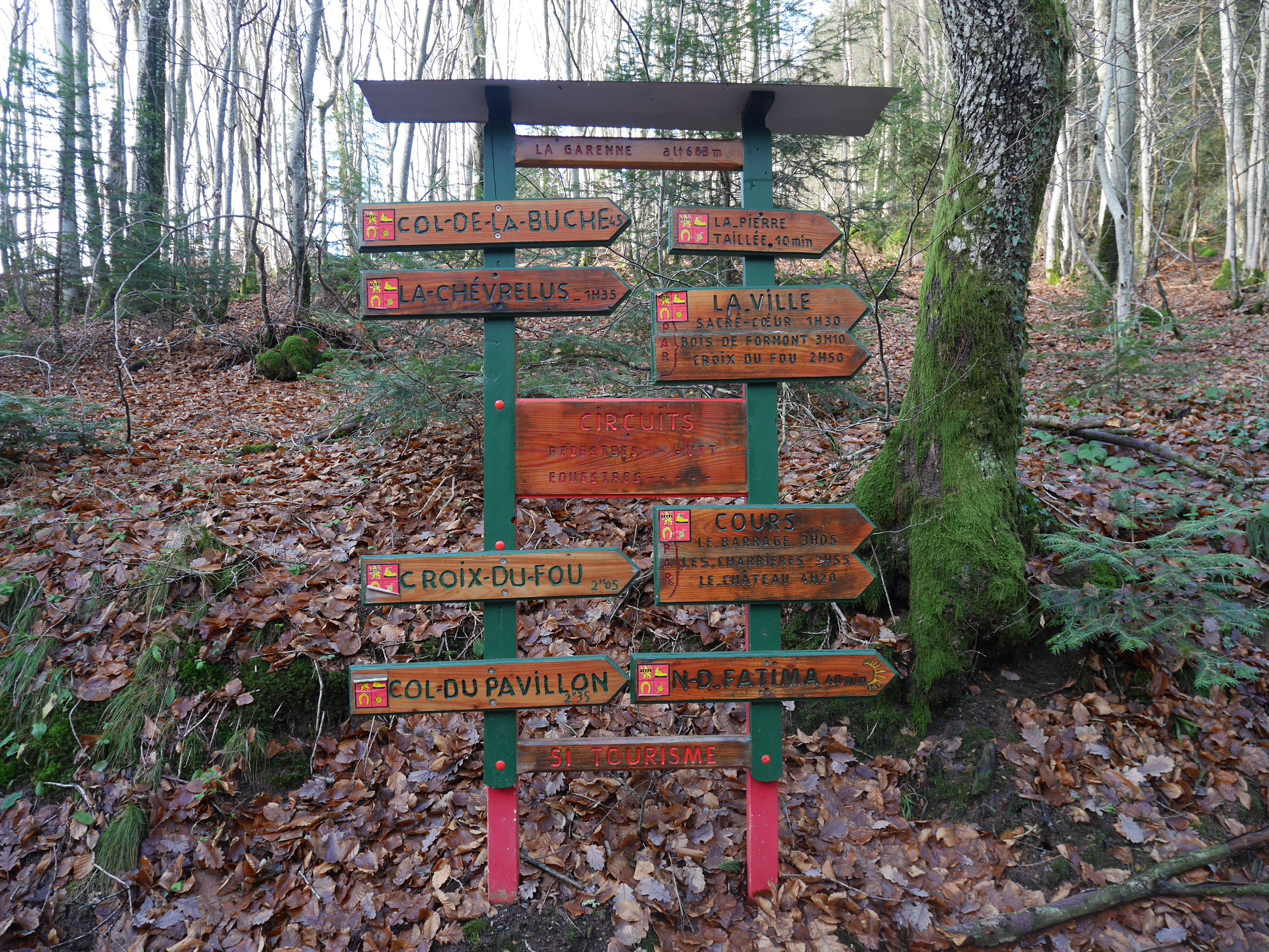 Sentiers de randonnée pédestre, équestre et VTT à Cours-la-Ville (Rhône)